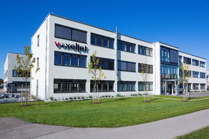 voxeljet Standort in Friedberg, Bayern